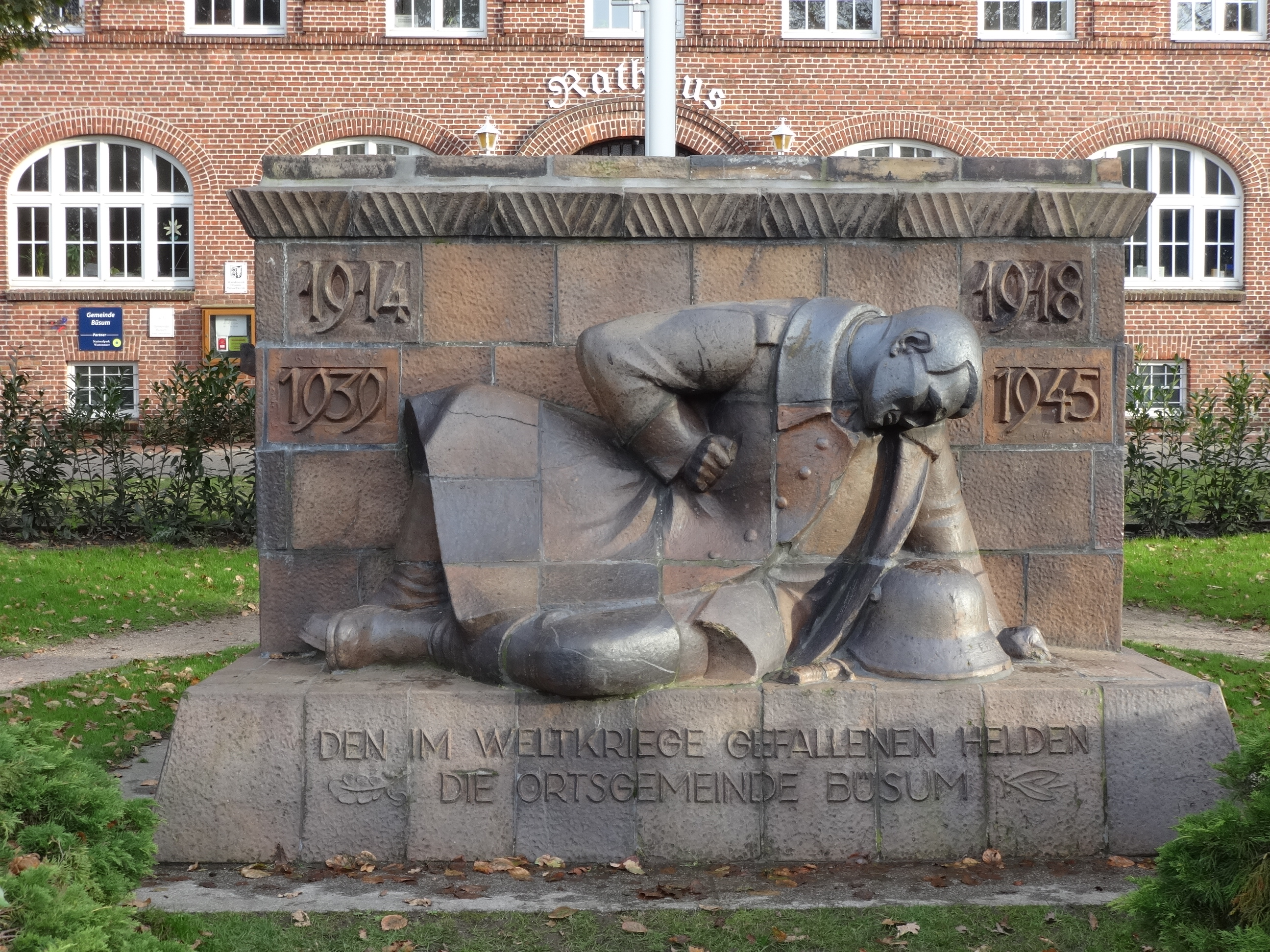 Zweigeschossiger Bau im Barockstil, erbaut von 1914 bis 1915 von C. Mannhardt aus Kile. Vor dem Gebäude befindet sich der Kaiser-Wilhelm-Platz mit einem Ehrenmal für Gefallene der Weltkriege.